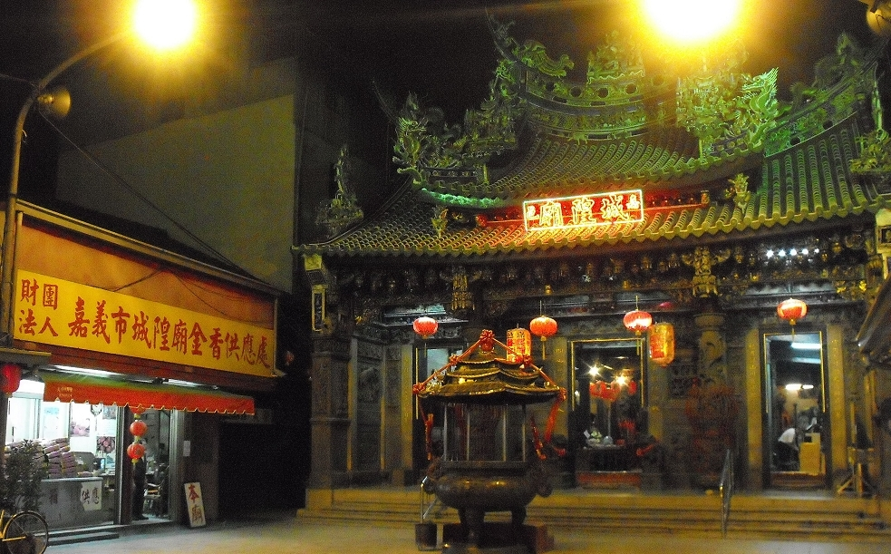 嘉邑城隍廟